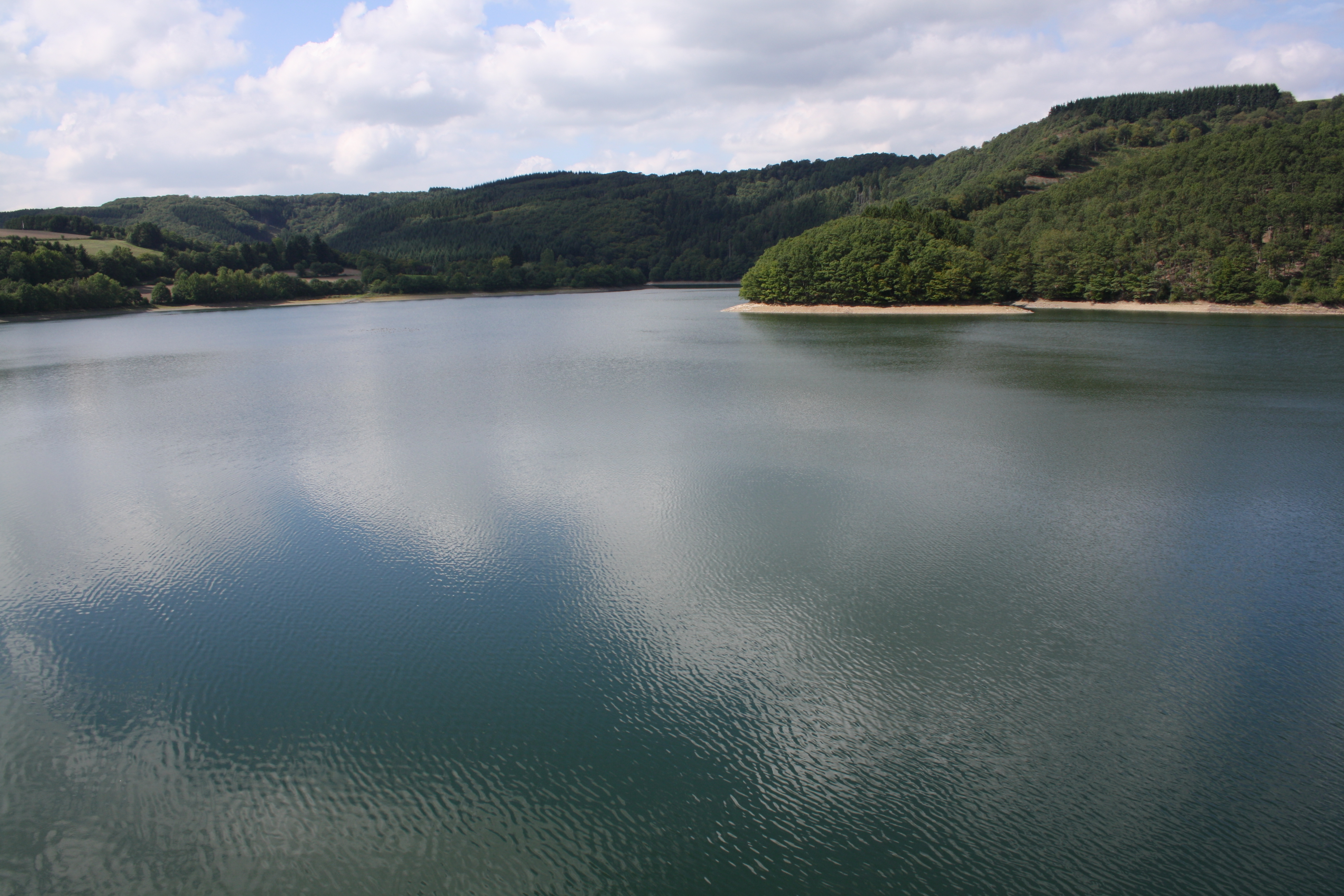 Lac de la Haute Sure